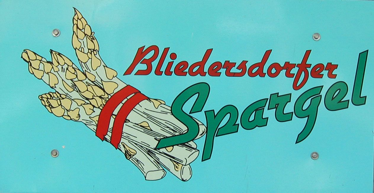 Schild: "Bliedersdorfer Spargel" - Sign: "Asparagus of Bliedersdorf"